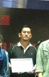 Semasa menghadiri majlis MyCreative Writers Unleashed pada tahun 2015